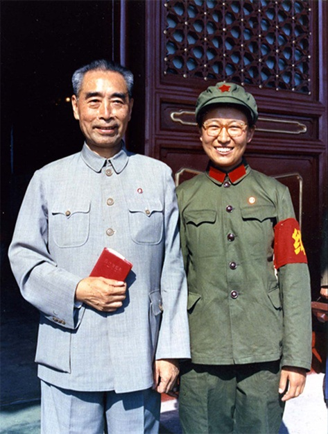 1966年10月1日，周恩来与李讷。